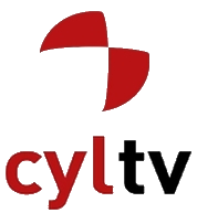 Logo CyLTV